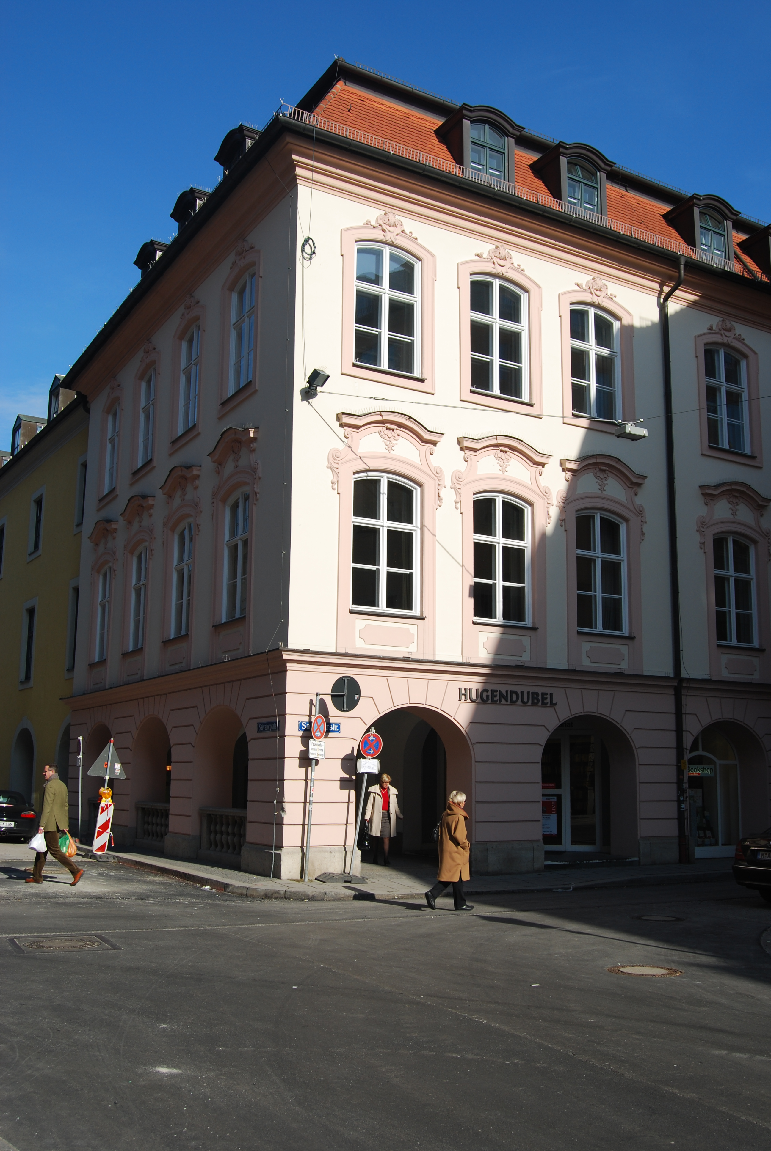 Ehemaliges Stammhaus der Buchhandlung Hugendubel am Salvatorplatz in München, Salvatorplatz 2